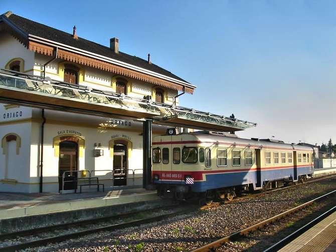 Emanuele Lo Rito, stazione di Oriago di Mira